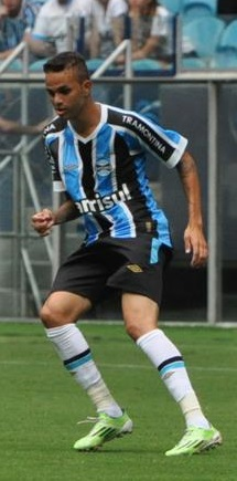 Luan Guilherme atuando pelo Grêmio em partida contra a União Frederiquense pelo Campeonato Gaúcho de 2015.